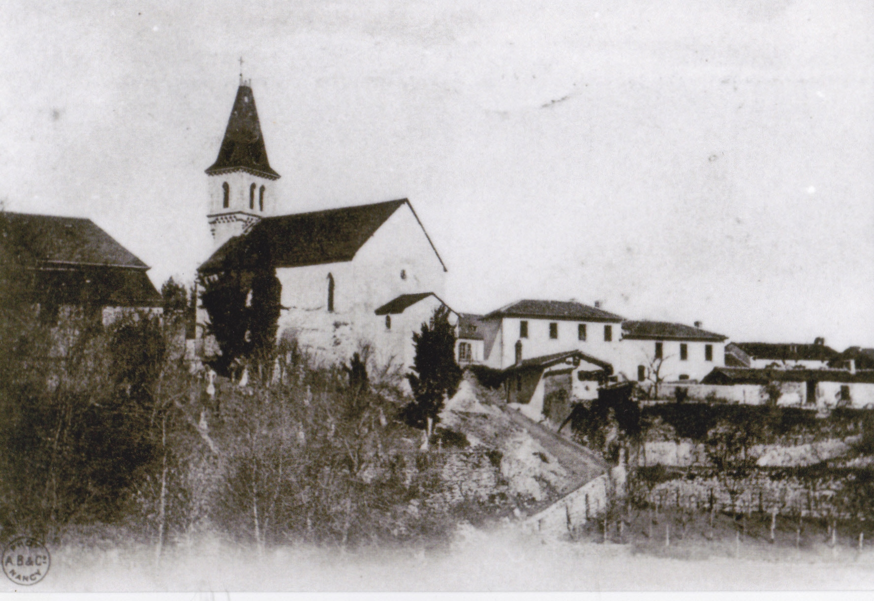 Eglise et vieux cimetière début XX°s.